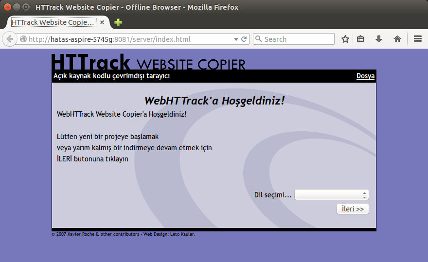 HTTrack'ın "WebHTTrack" arayüzü. Ubuntu işletim sisteminde Firefox web tarayıcısında.